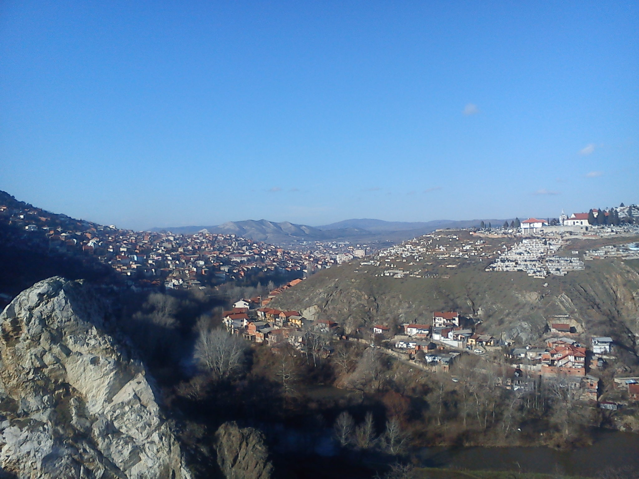 Поглед на градот Велес од ридовите над реката Тополка